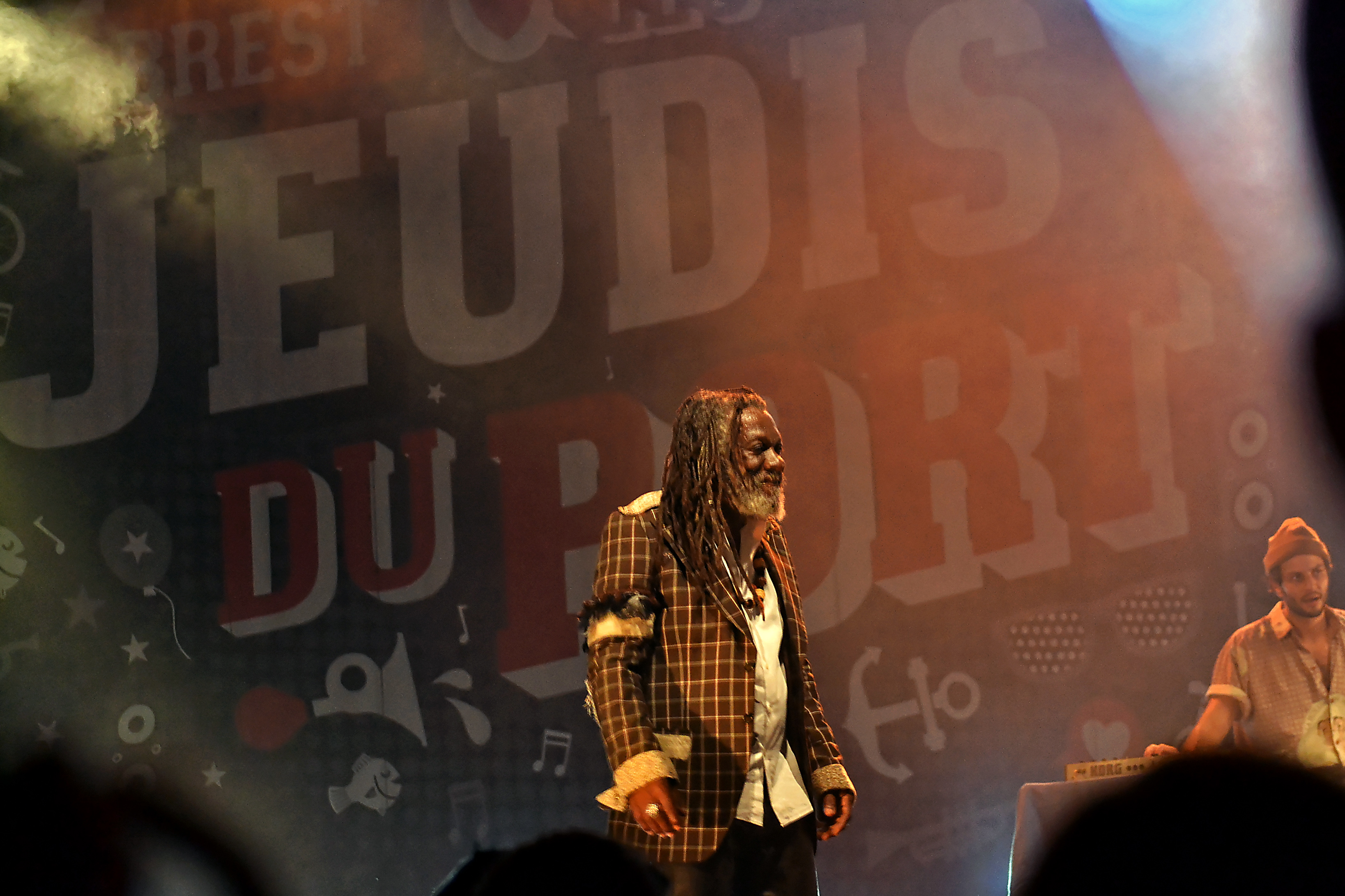 Winston McAnuff & Fixi en concert pour Les Jeudis du port à Brest le 13 août 2015.